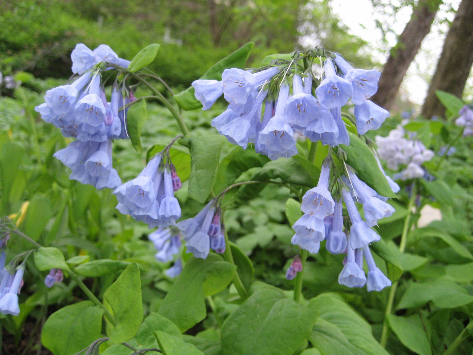 Mertensia virginica - Blüte - Bot. Garten Berlin Dahlem